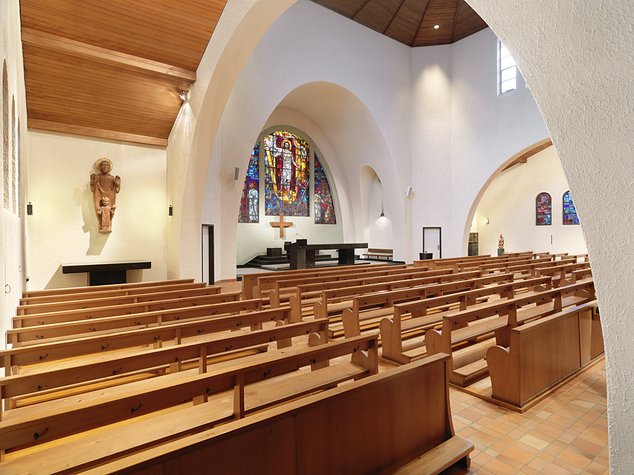 Römisch-katholische Kirche St. Martin, Zürich, Blick quer auf Altarbereich